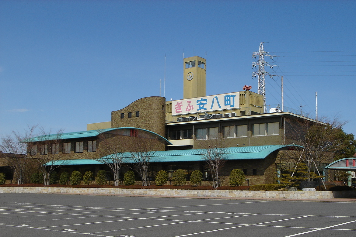 Anpachi Town hall（安八町役場）,Anpachi,Gifu,Japan(岐阜県安八町)で撮影。